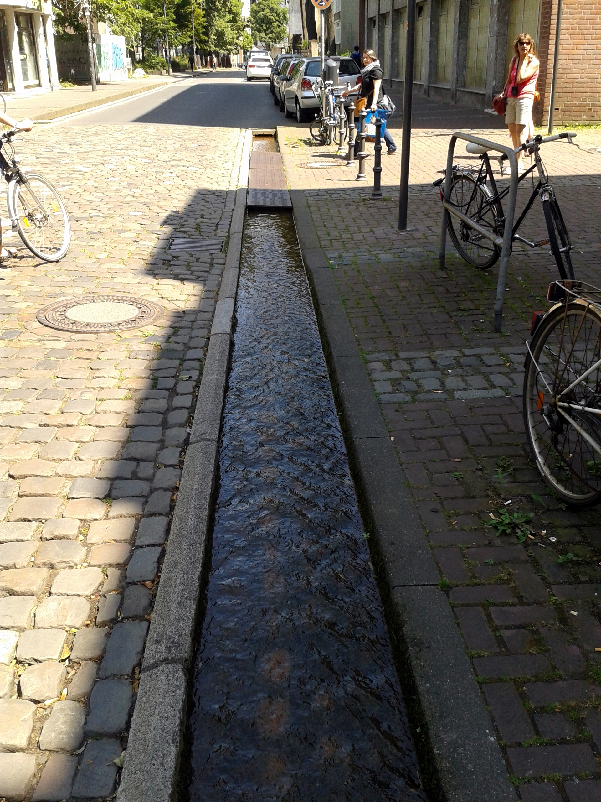 Johannisbach Aachen - Offenlegung im Bereich Annuntiatenbach/Augustinerbach